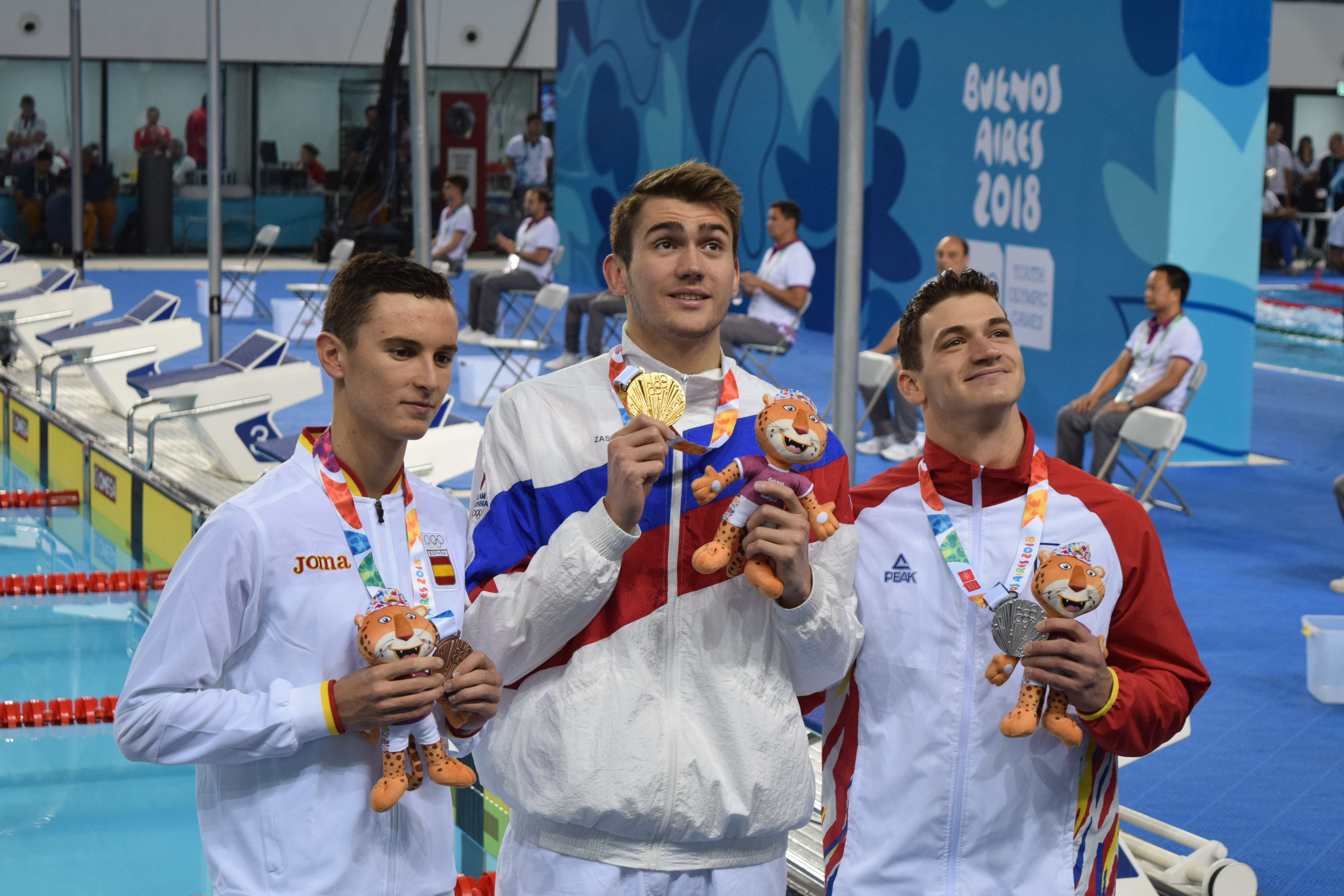 Finales de natación , durante los Juegos Olímpicos de la Juventud 2018 en Buenos Aires. Tarde del 10 de octubre. Kliment KOLESNIKOV, Daniel Cristian MARTIN y Manuel MARTOS BACARIZO.